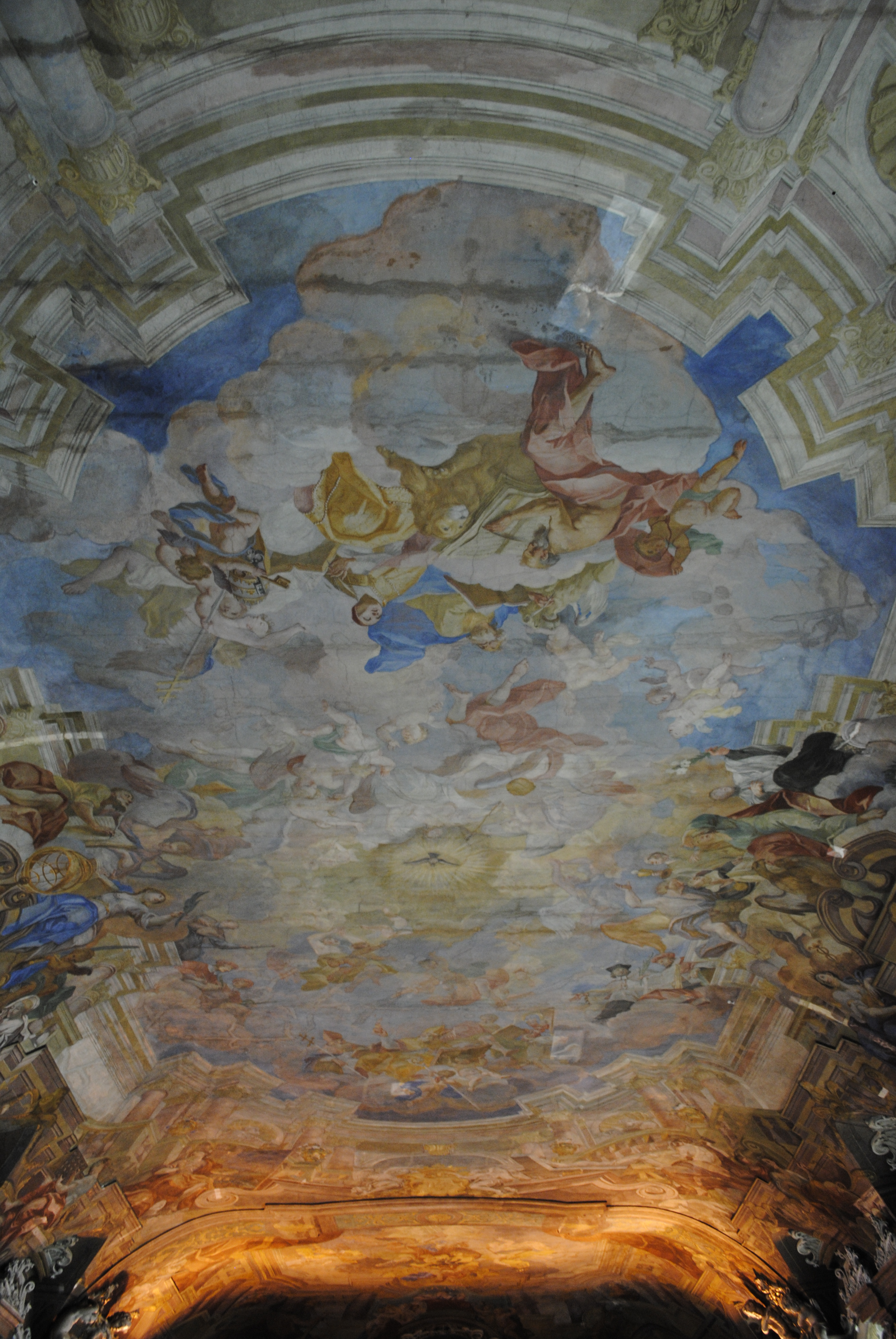 Deckenfresken in der Aula Leopoldina